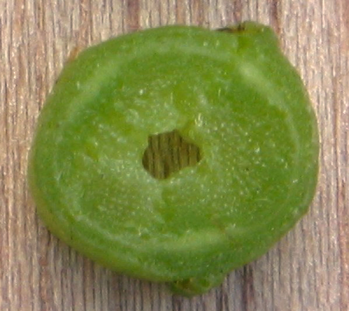 Solanum tuberosum